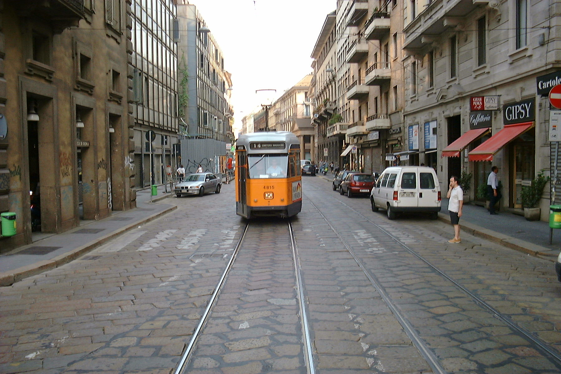 Vettura tranviaria serie 4800 dell'ATM di Milano in via Broletto.